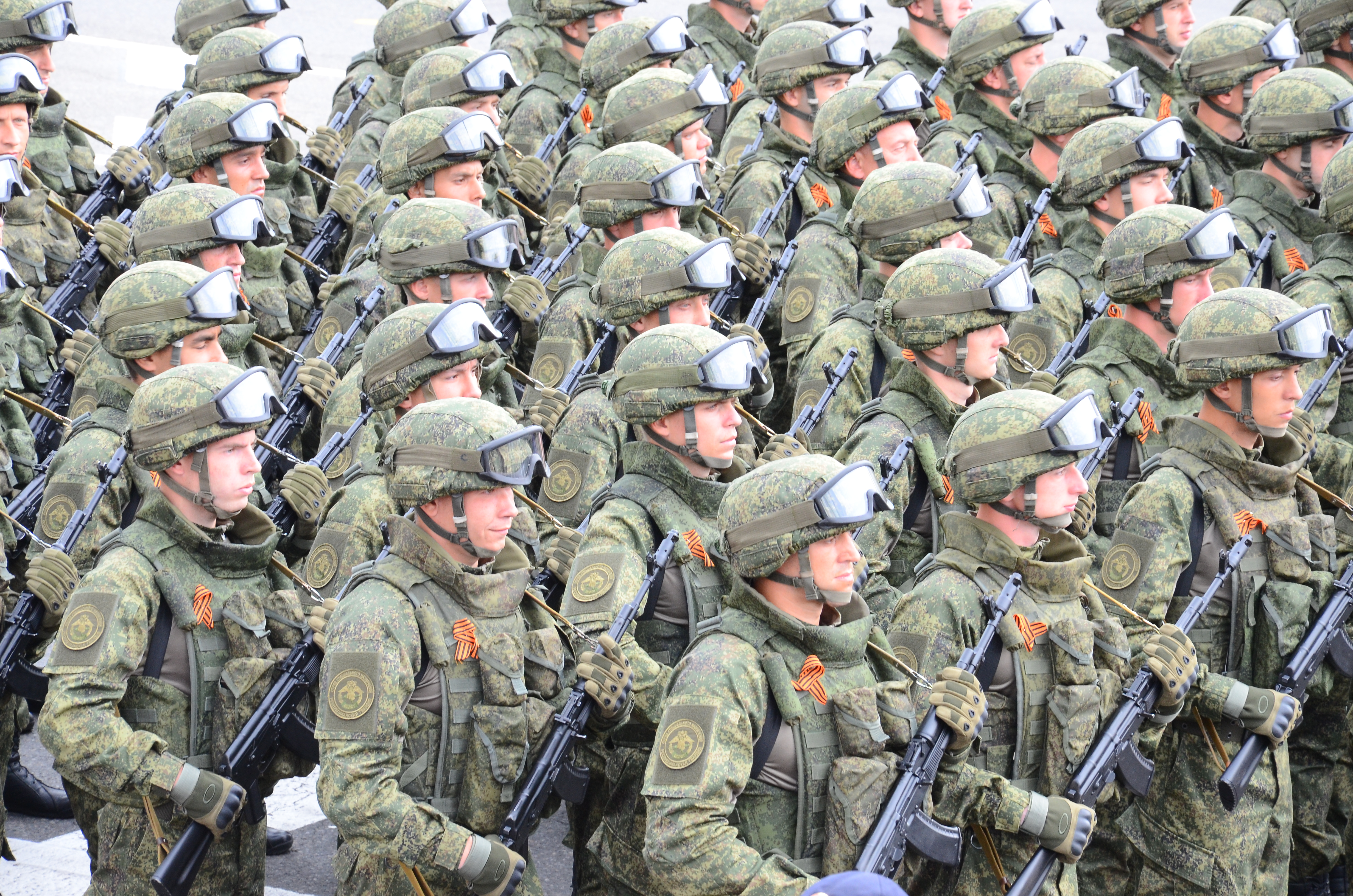 День Победы в Донецке